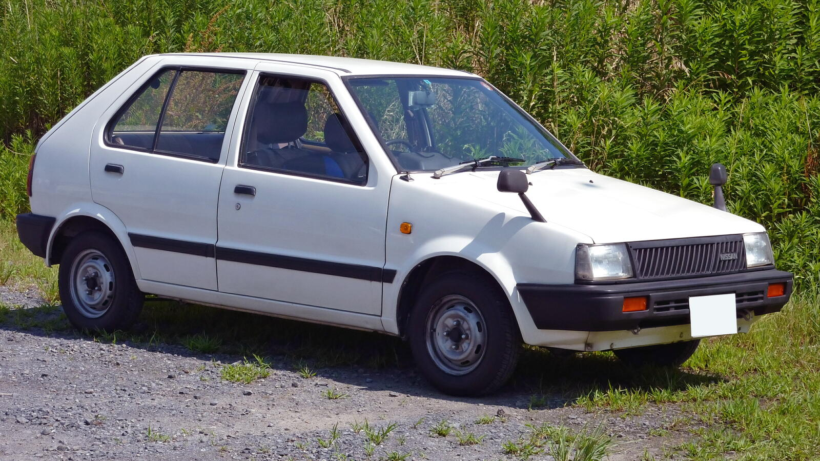 日産・マーチ（初代・中期型）